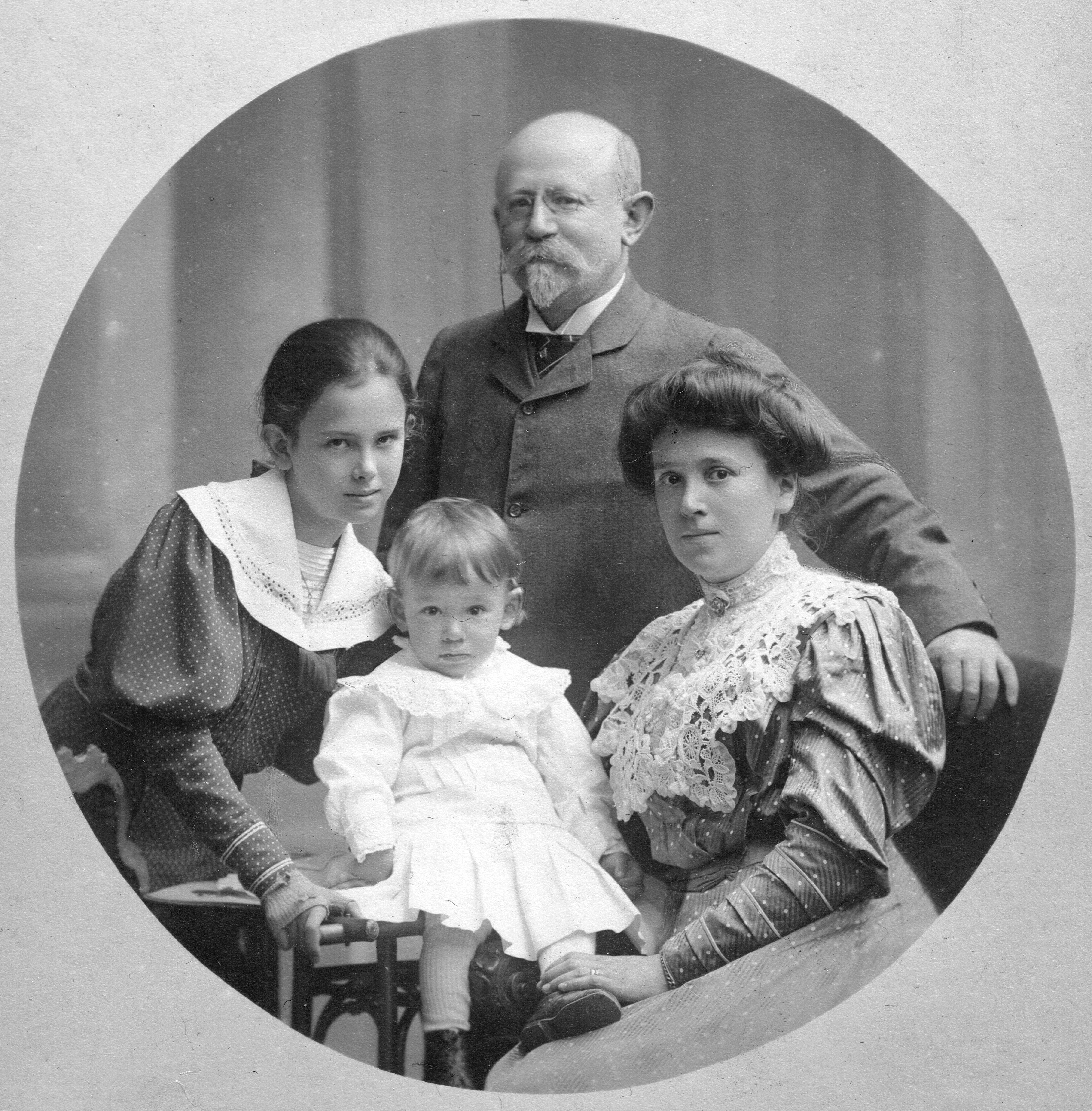 Young Walter Bricht with his family